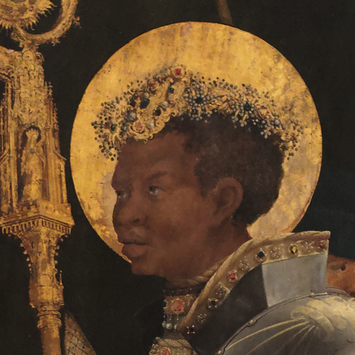 Saint Maurice (détail) par Matthias Grünewald. Alte Pinakothek, Munich